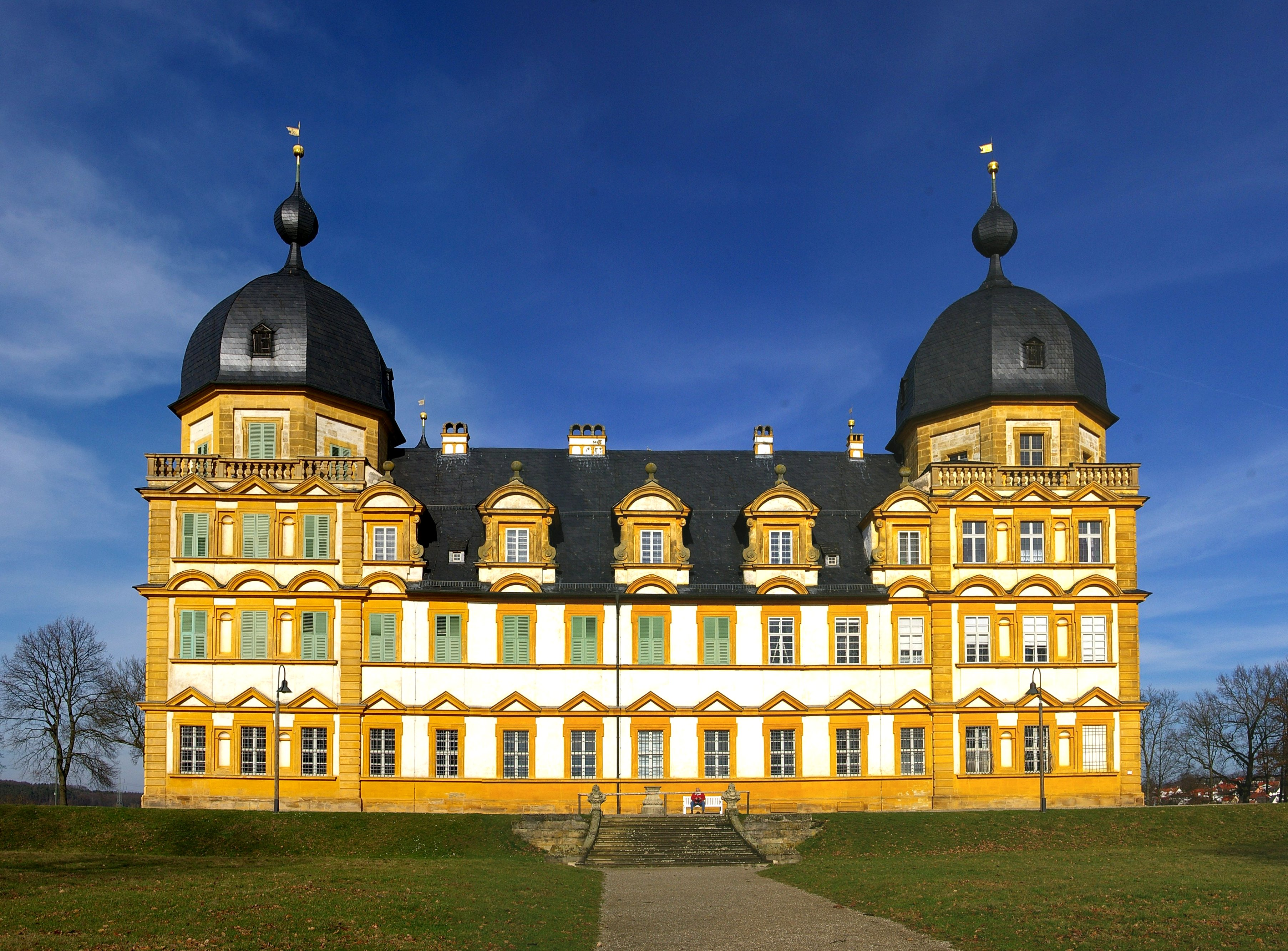 Schloss Seehof - Parkseite Front